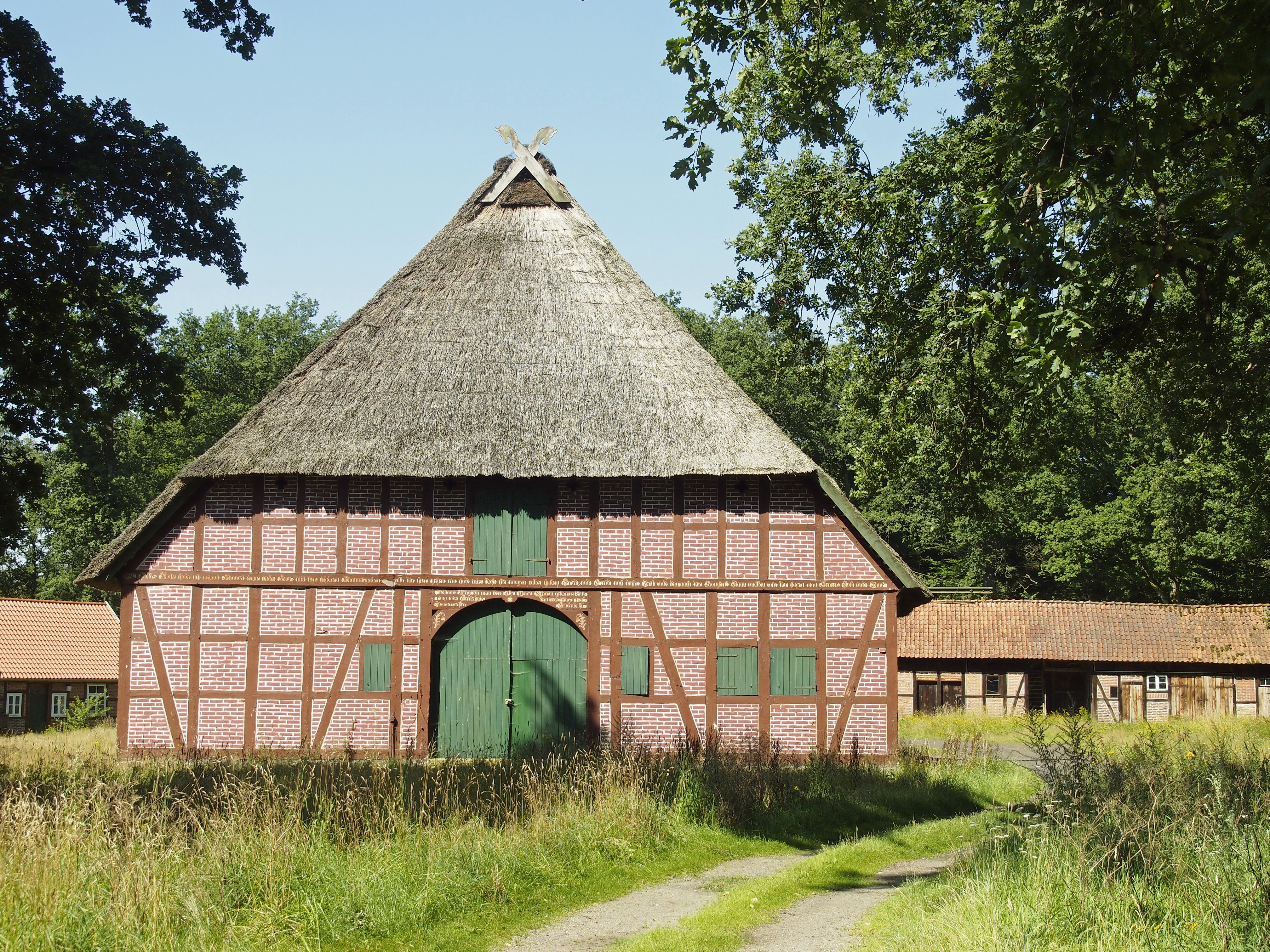 Hofstelle Altensothrieth nahe Unterlüß, ehemals der landwirtschaftliche Betrieb der Firma Rheinmetall, Unterlüß